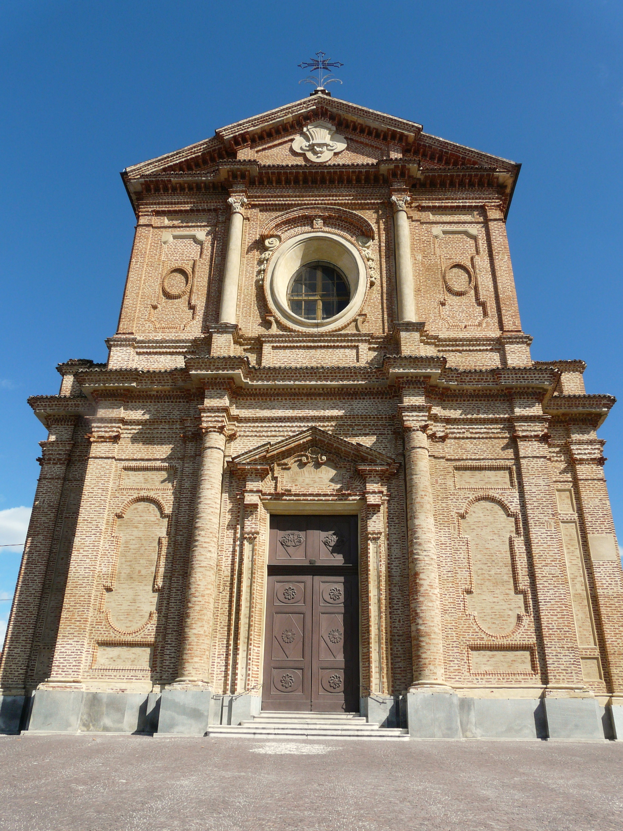 Facciata della chiesa della Natività di Maria Vergine, Marene, Piemonte, Italia